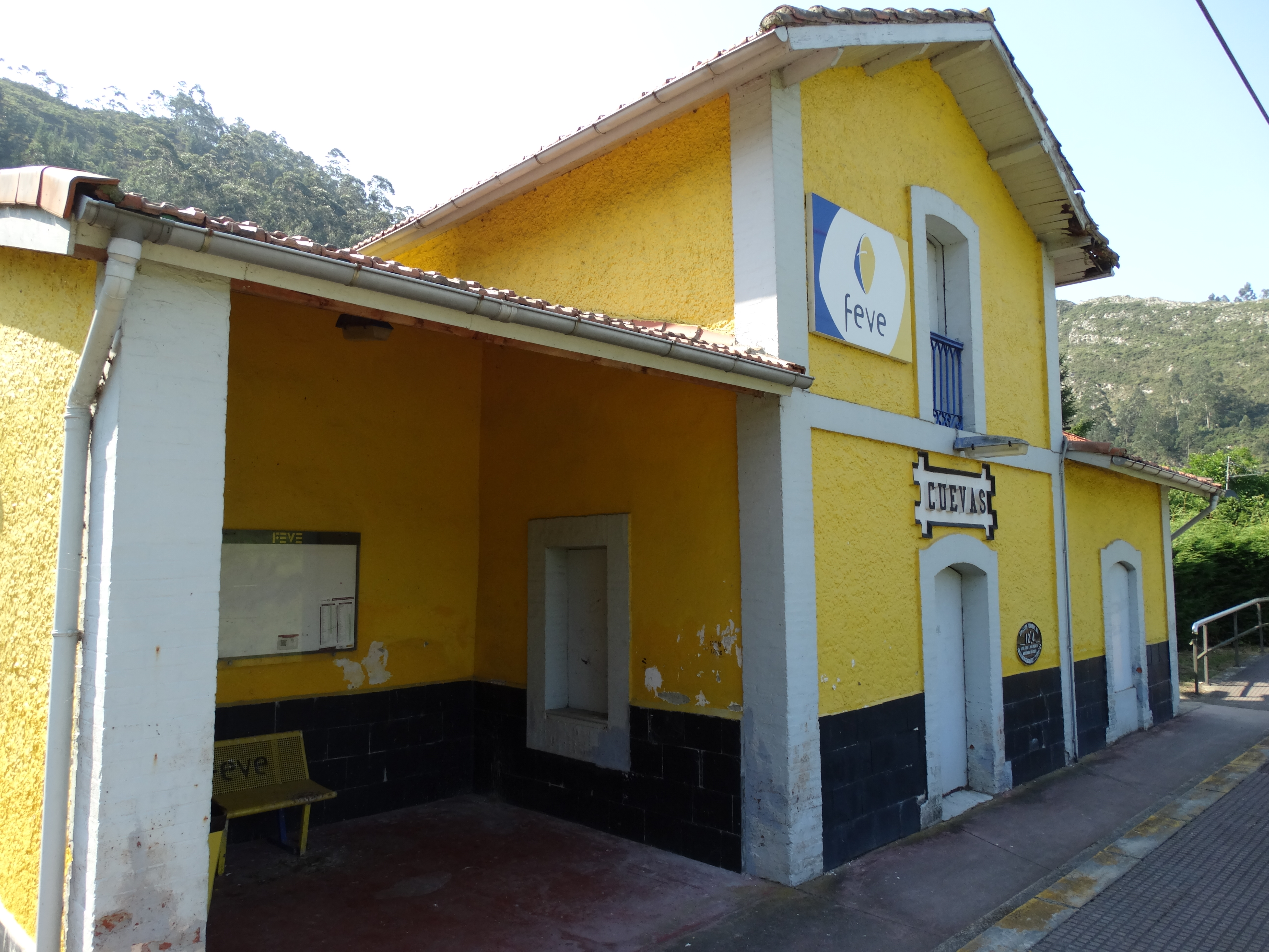 Núcleo de población de Cuevas en la parroquia de Junco, concejo de Ribadesella (Asturias, España). Estación de Cuevas (FEVE).